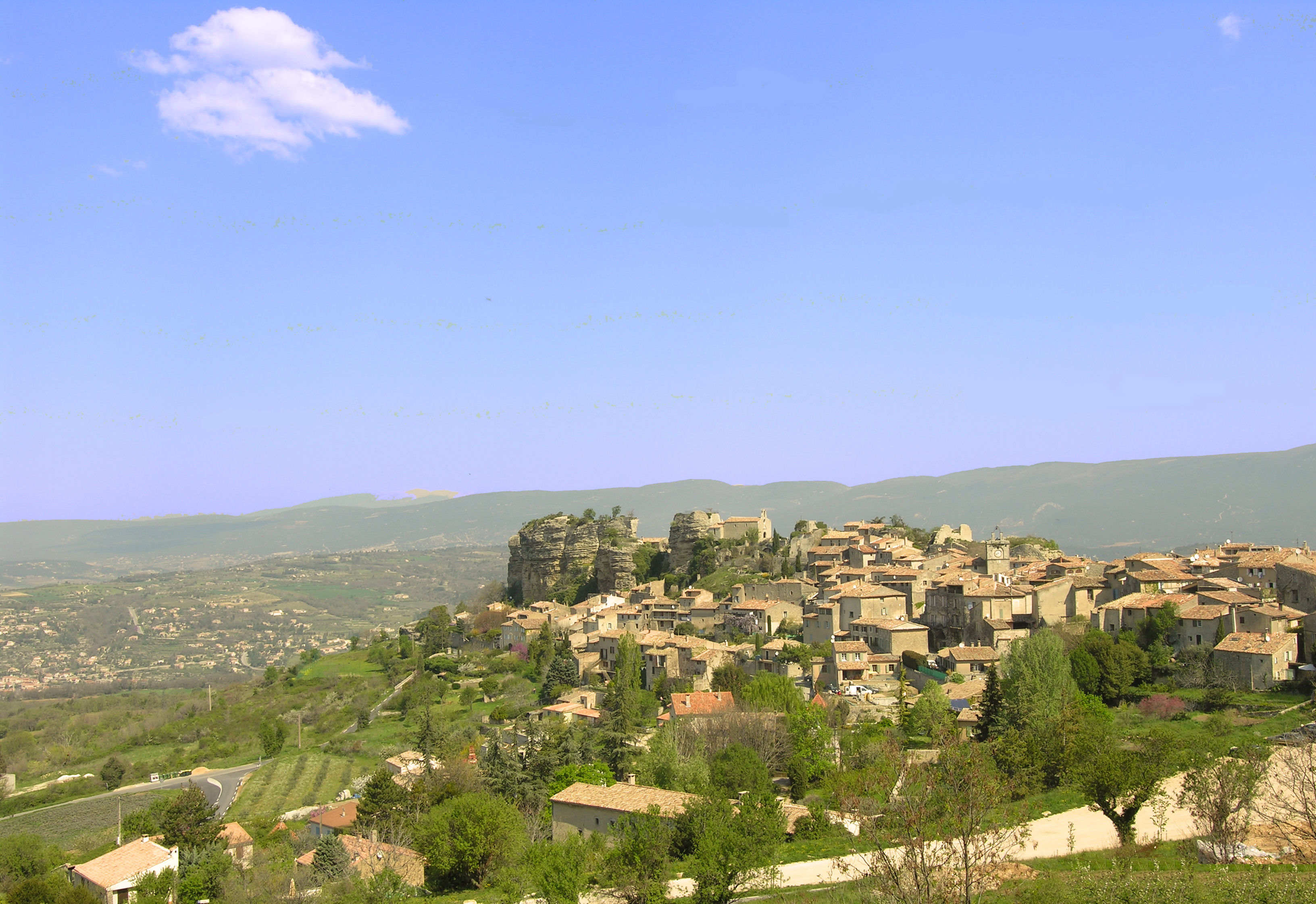 Le village de Saignon